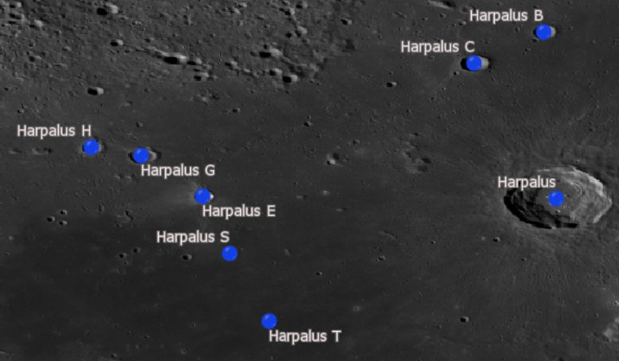 Cráter lunar Harpalus. Cráteres satélite. (Imagen LRO)